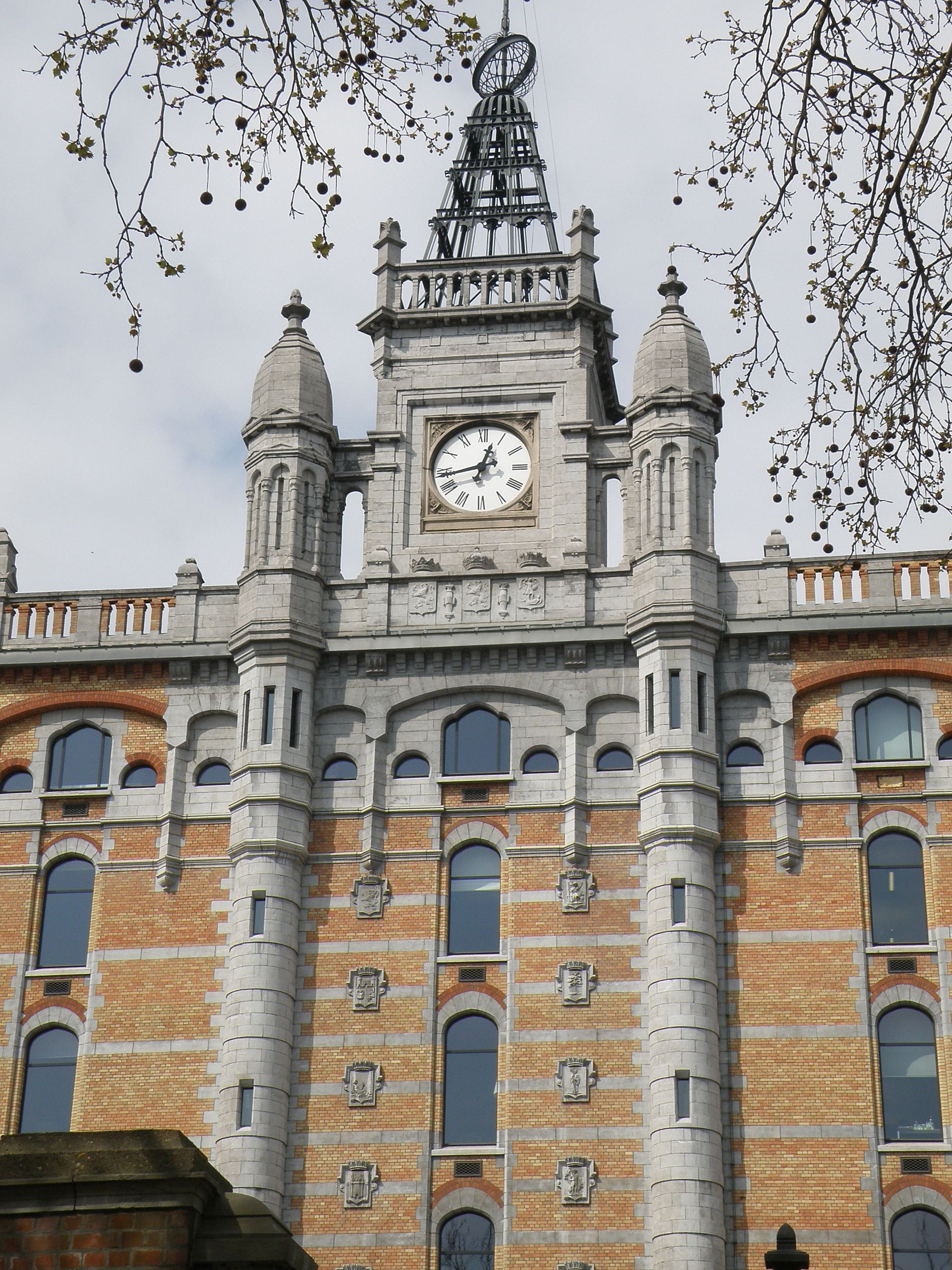 Bruxelles, Belgique. Site de Tour et Taxis (en néerl. Thurn en Taxis), situé avenue du Port, le long du canal de Bruxelles. Façade de l’Entrepôt royal, construit entre 1904 et 1907 selon les plans de l’architecte Ernest Van Humbeek. Travée centrale avec tour à horloge.